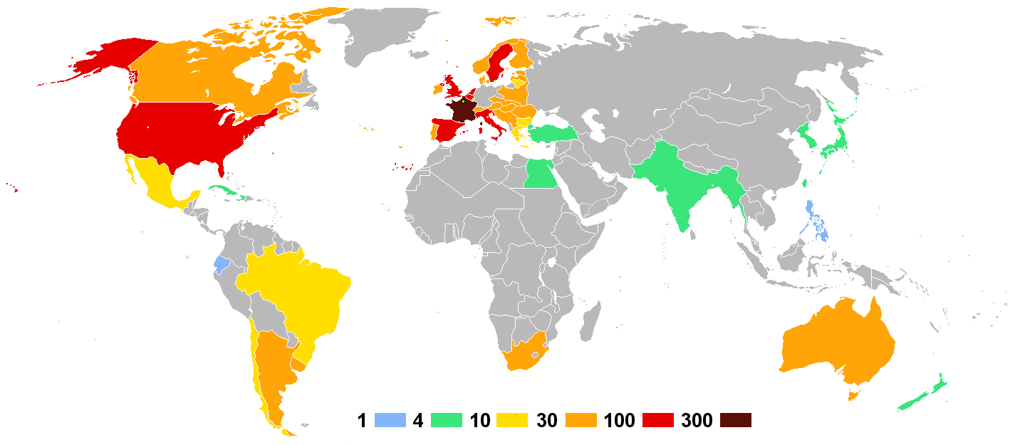 Olympische Sommerspiele 1924 — Anzahl der Athleten